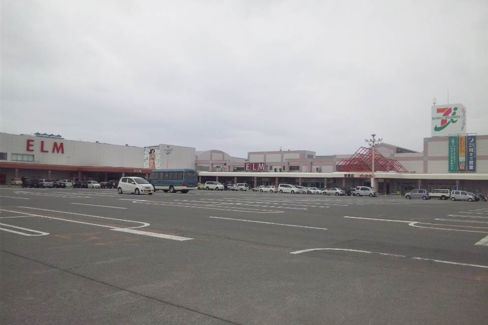 エルムの街・外観